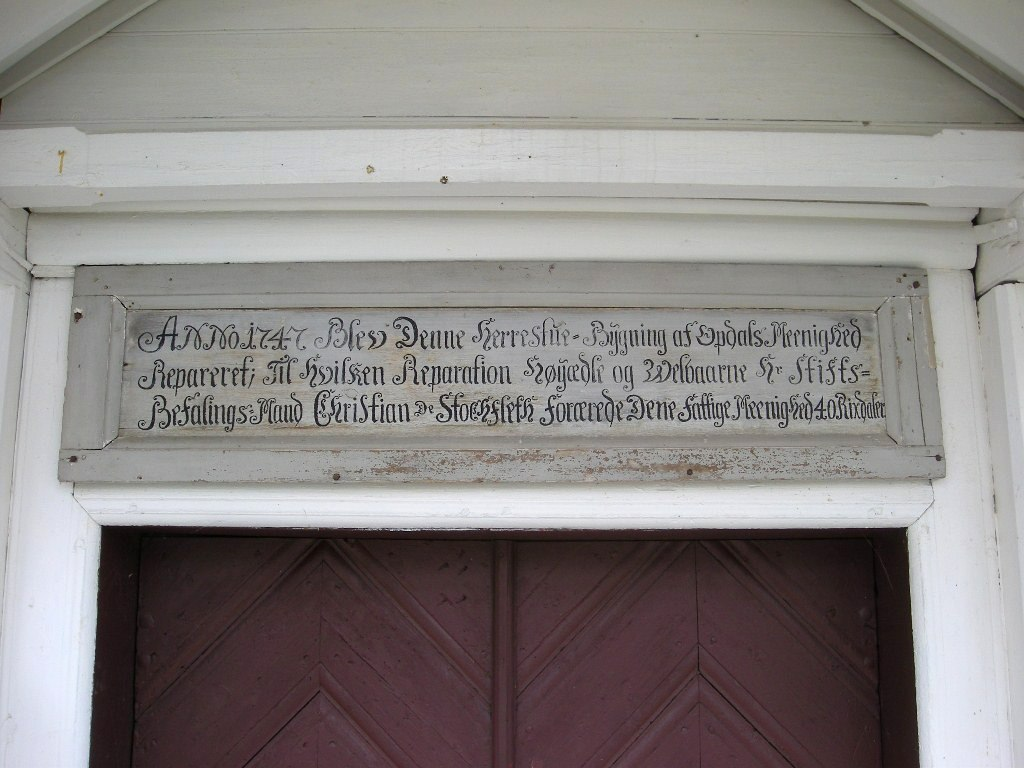 Sponsorens navn fra da Raulåna ble pusset opp til et kongebesøk i 1747.